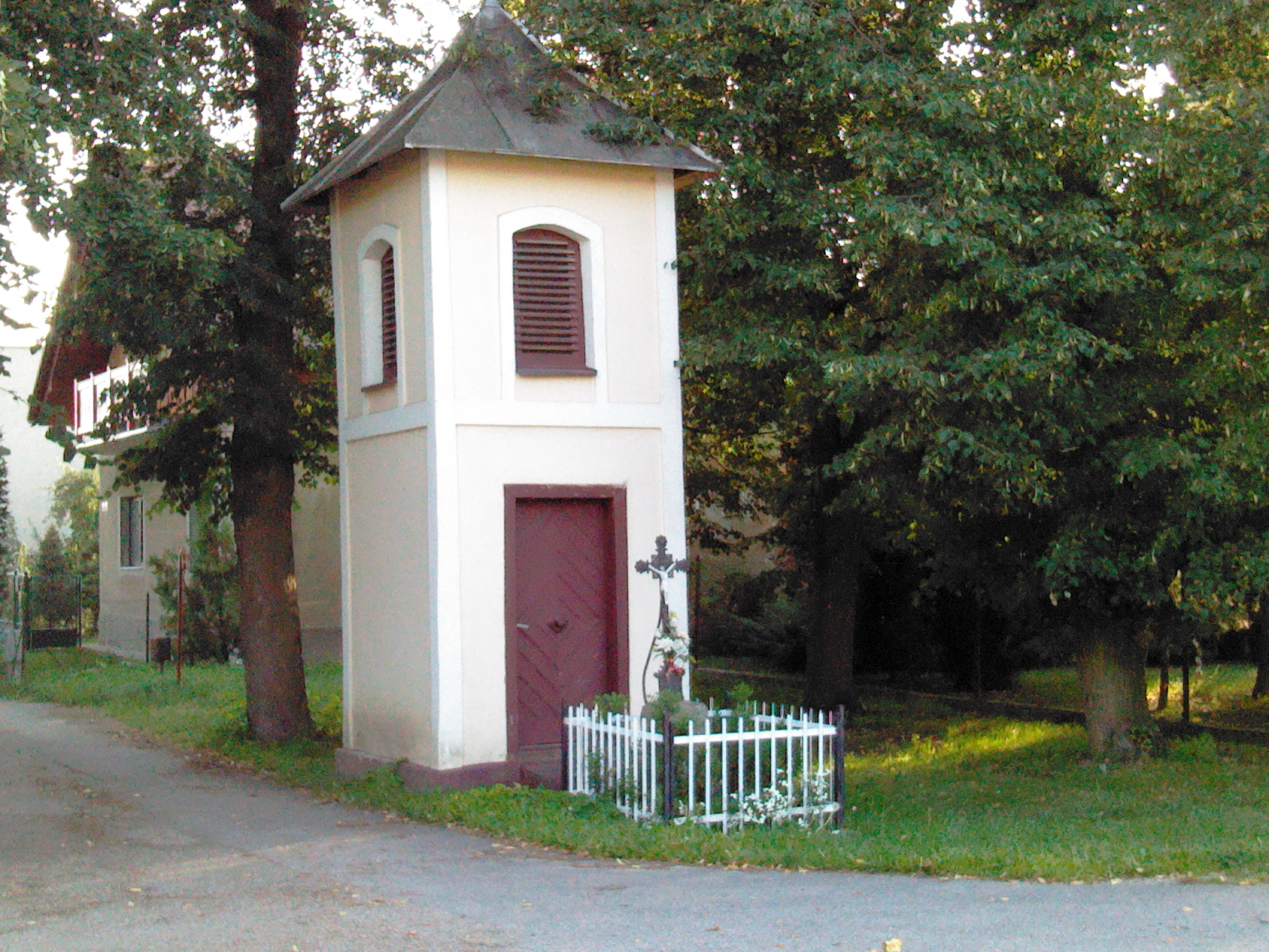 Na obrázku sa nachádza zvonica v Prilese 8. 6. 2012 o 17:05.Obrázok bol vyhotoveny fotoaparátom na tablete HUAWEI Media pad